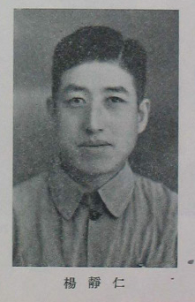 中文（台灣）: 中國人民政治協商會議第一屆全體會議代表